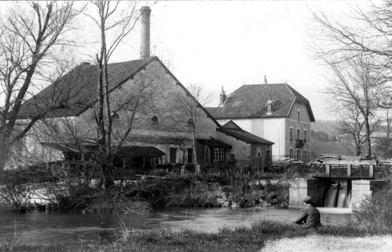 moulin de Chenecieres